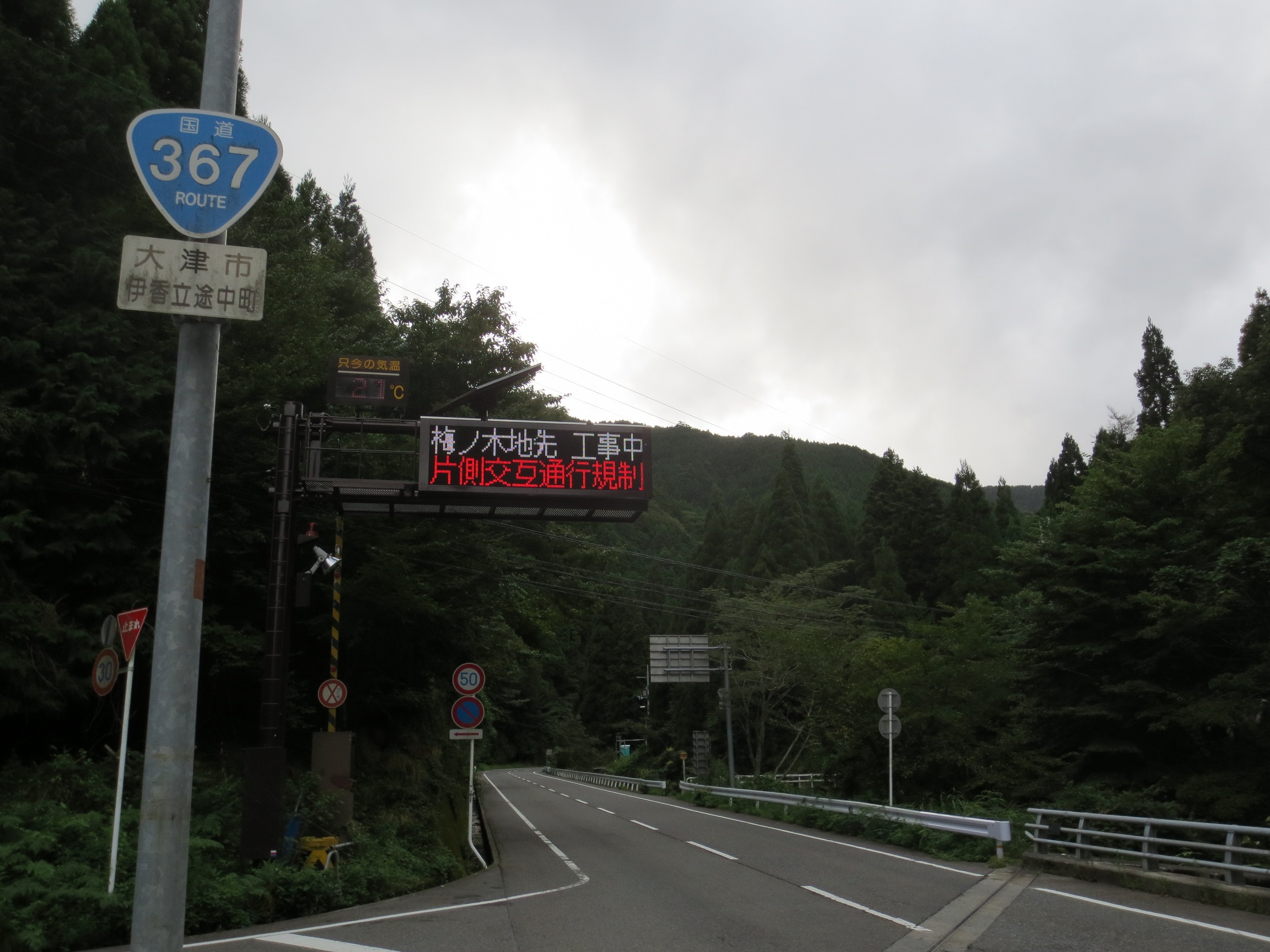 大津市伊香立途中町 途中トンネル付近の国道367号。